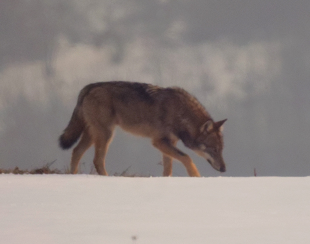 Grey wolf, Medelana, Bologna